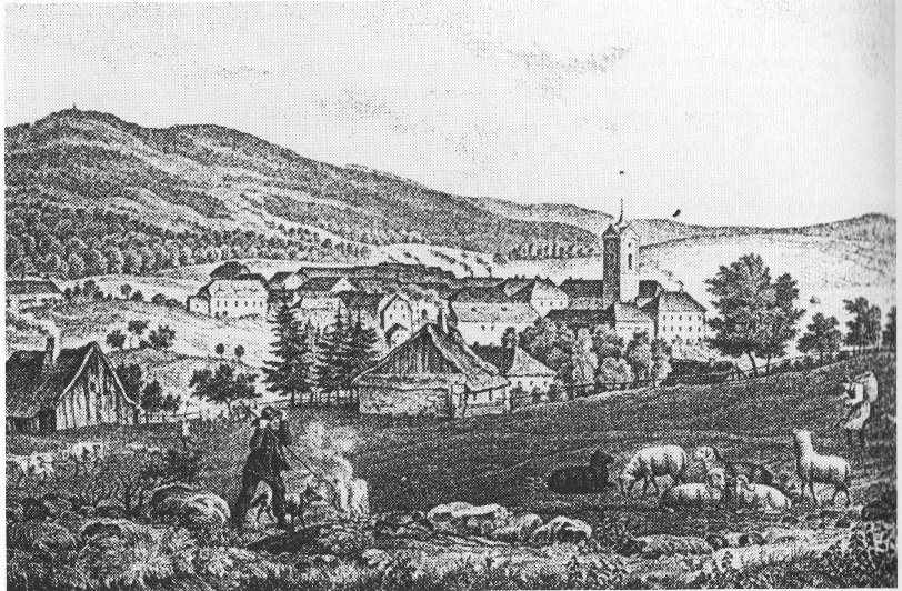 Älteste Darstellung von Zell im Fichtelgebirge